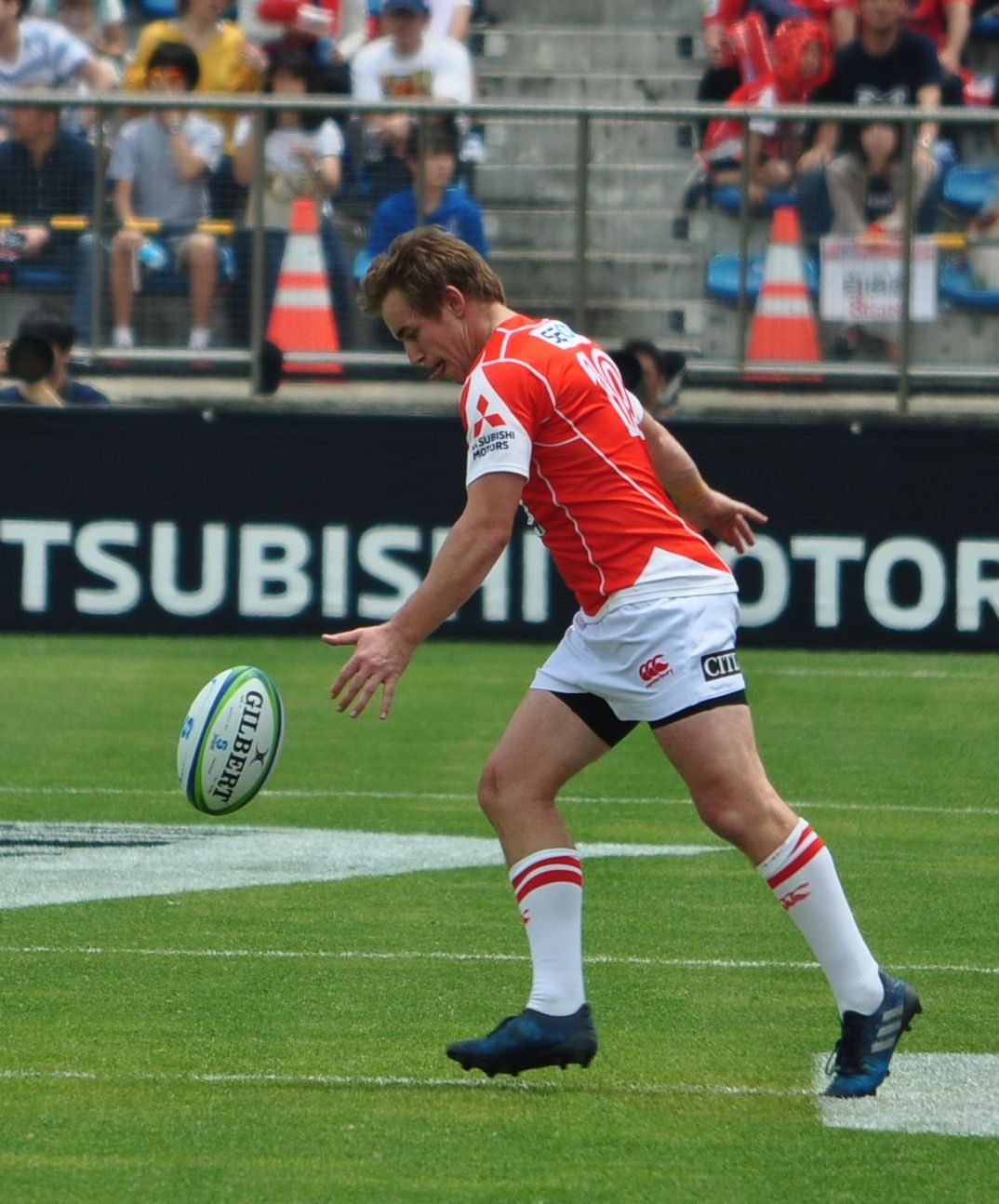 サンウルブズ vs レッズ戦